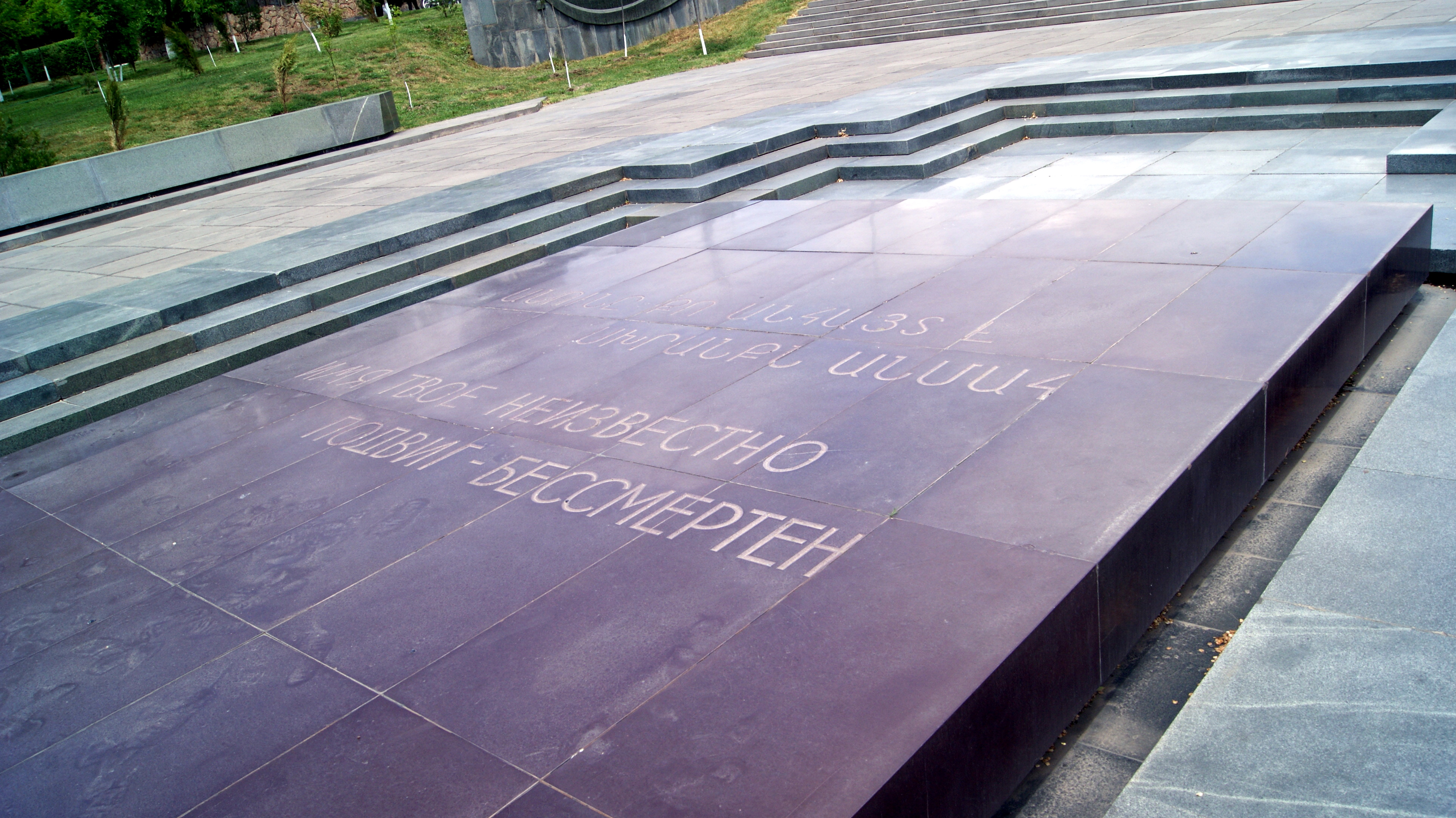 Mother Armenia Monument, Yerevan 12/10.3